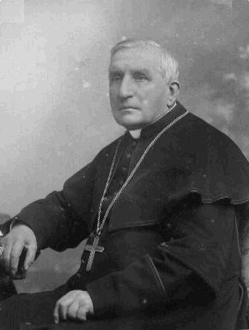 Antonín Hora (1824-1906), český římskokatolický kněz, děkan a probošt Metropolitní kapituly u sv. Víta v Praze